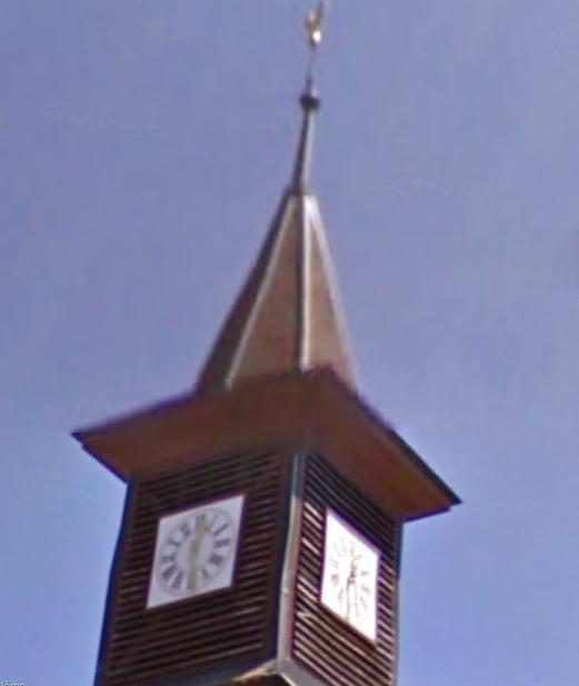 Clocher de l'église de Cheseaux